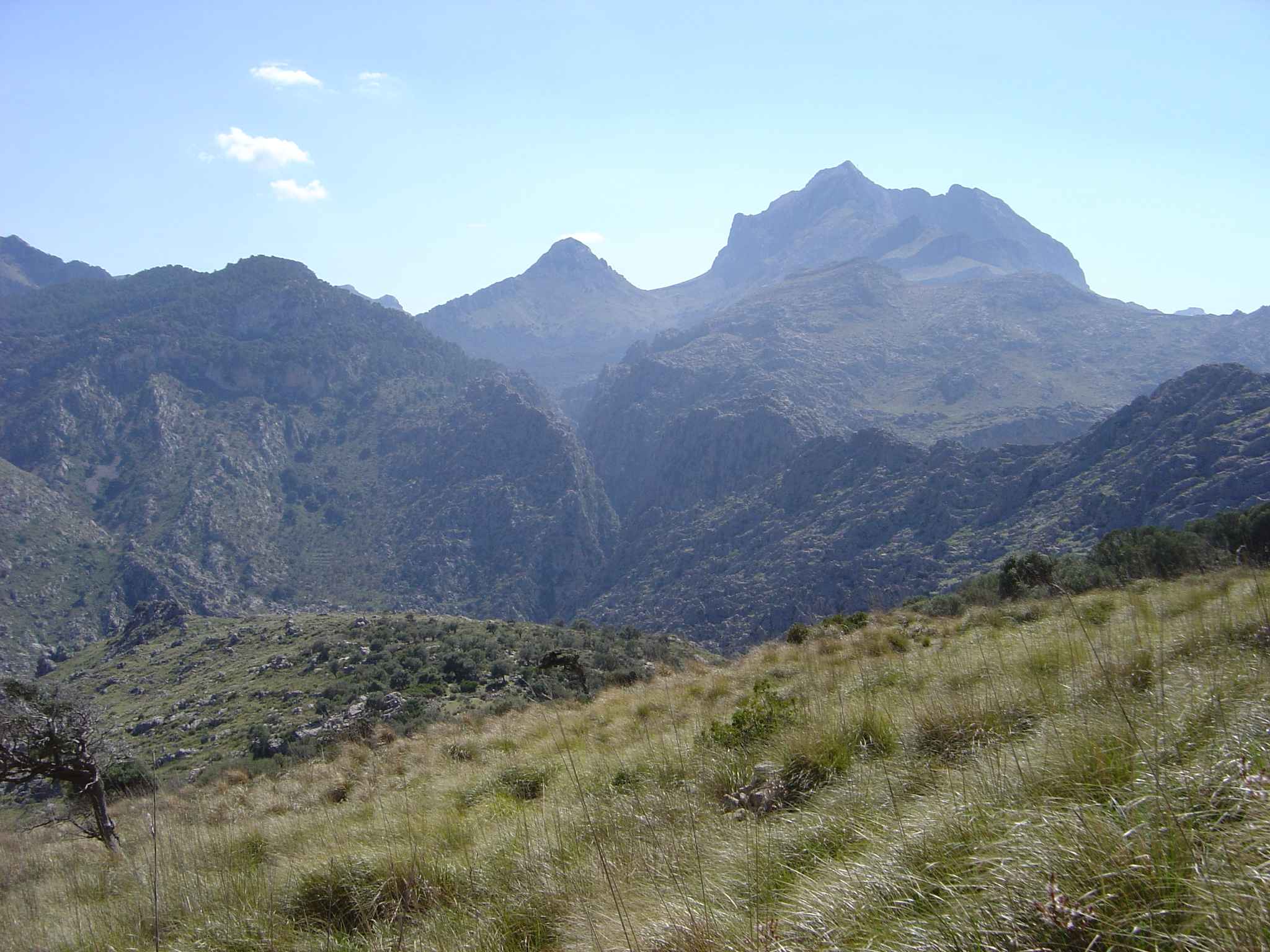 El Puig Major (i el Puig de Ses Vinyes). Escorca. Mallorca.